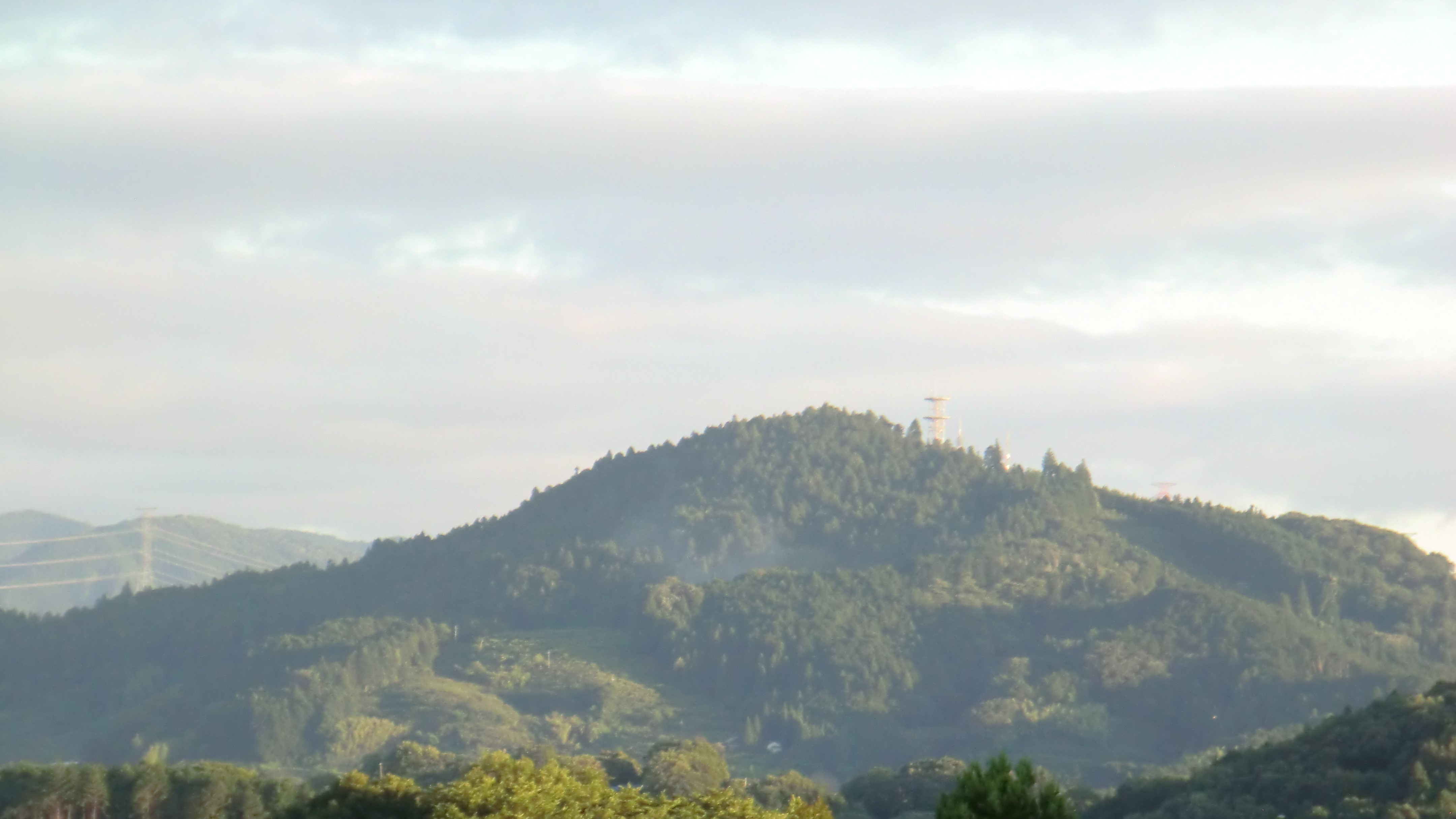 大淀町より望む栃原岳 (奈良県) 。